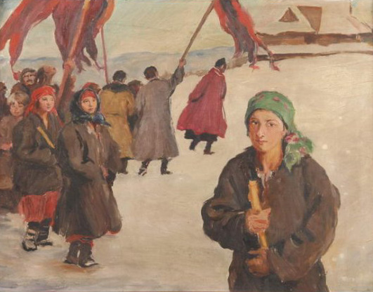 Крещение (Иордань)